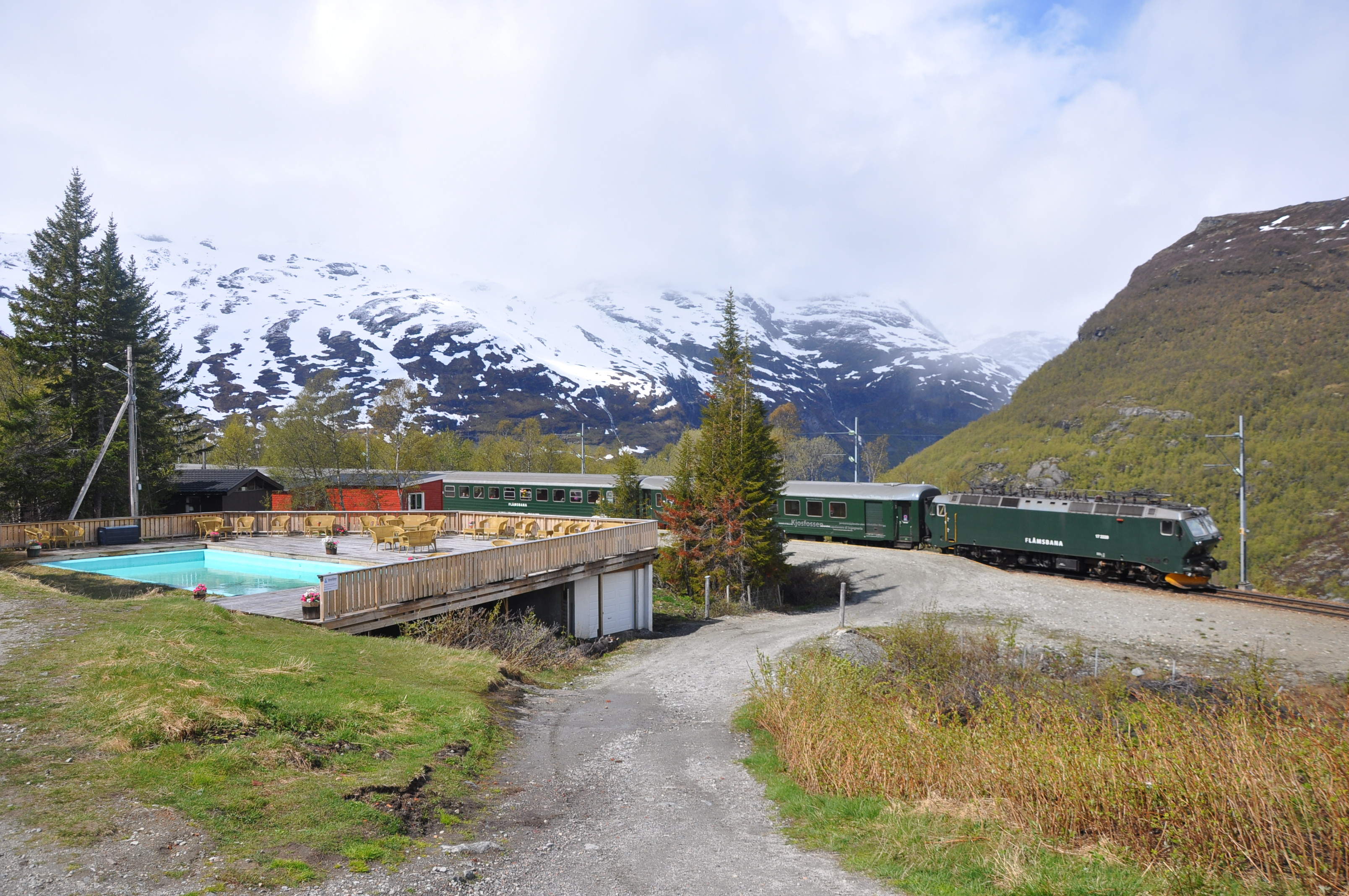 Flåmsbana ved Vatnahalsen holdeplass